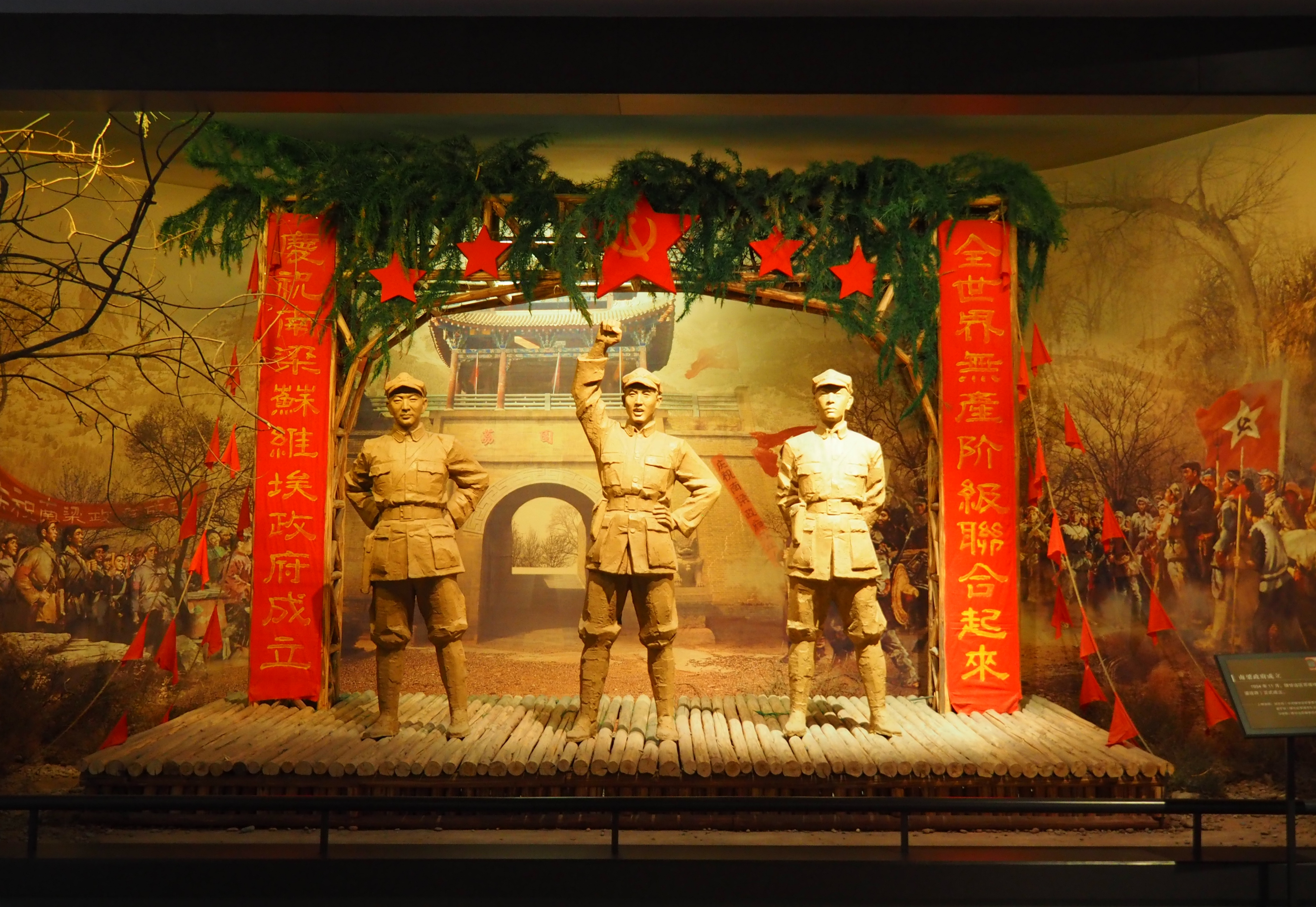 Gansu Provincial Museum